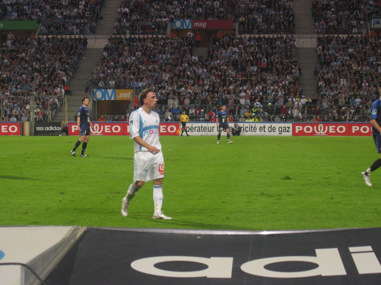 Franck Ribéry, lors du match de Ligue 1 OM-Lille le 29 octobre 2005 au Stade Vélodrome